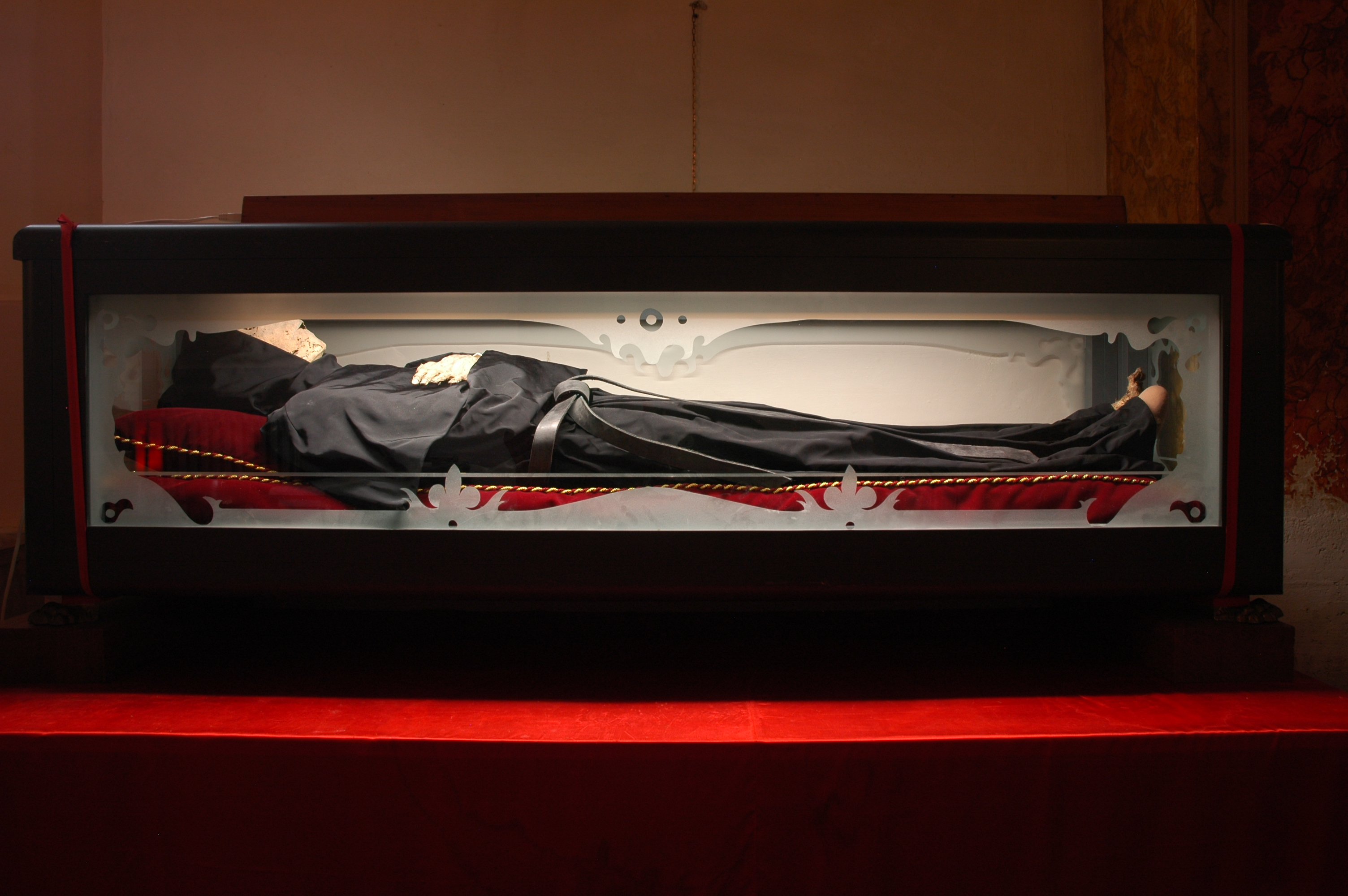 La salma del Beato Ugolino è da secoli conservata in un urna ed esposta alla venerazione dei fedeli. Manca il piede destro del santo, asportato e donato come reliquia.